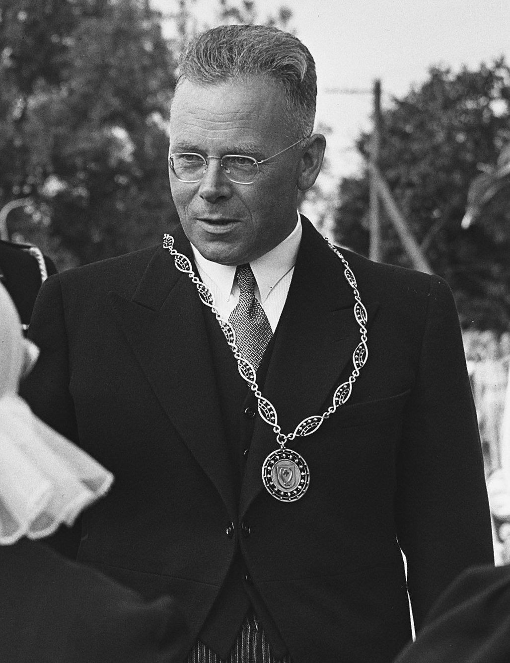 Collectie / Archief : Fotocollectie Anefo Reportage / Serie : [ onbekend ] Beschrijving : Bezoek H. M. de Koningin aan de kop van Overijssel. H. M. in gesprek met Giethoornse vrouwen Datum : 1 juli 1953 Locatie : Overijssel Trefwoorden : bezoeken, gesprekken, vrouwen Persoonsnaam : Juliana, koningin Fotograaf : Bilsen, Joop van / Anefo Auteursrechthebbende : Nationaal Archief Materiaalsoort : Glasnegatief Nummer archiefinventaris : bekijk toegang 2.24.01.09 Bestanddeelnummer : 905-8134